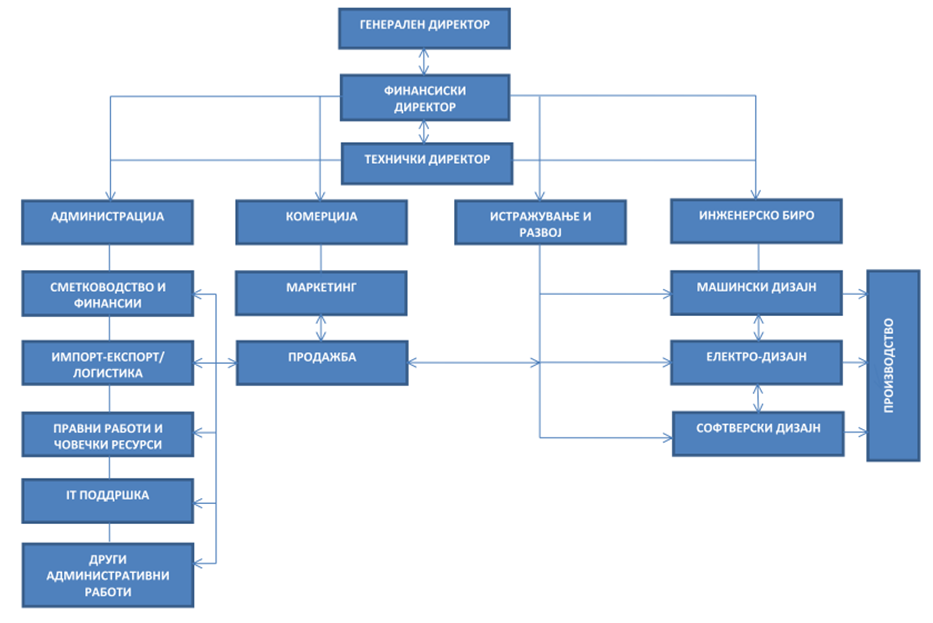 Организациска структура на компанијата